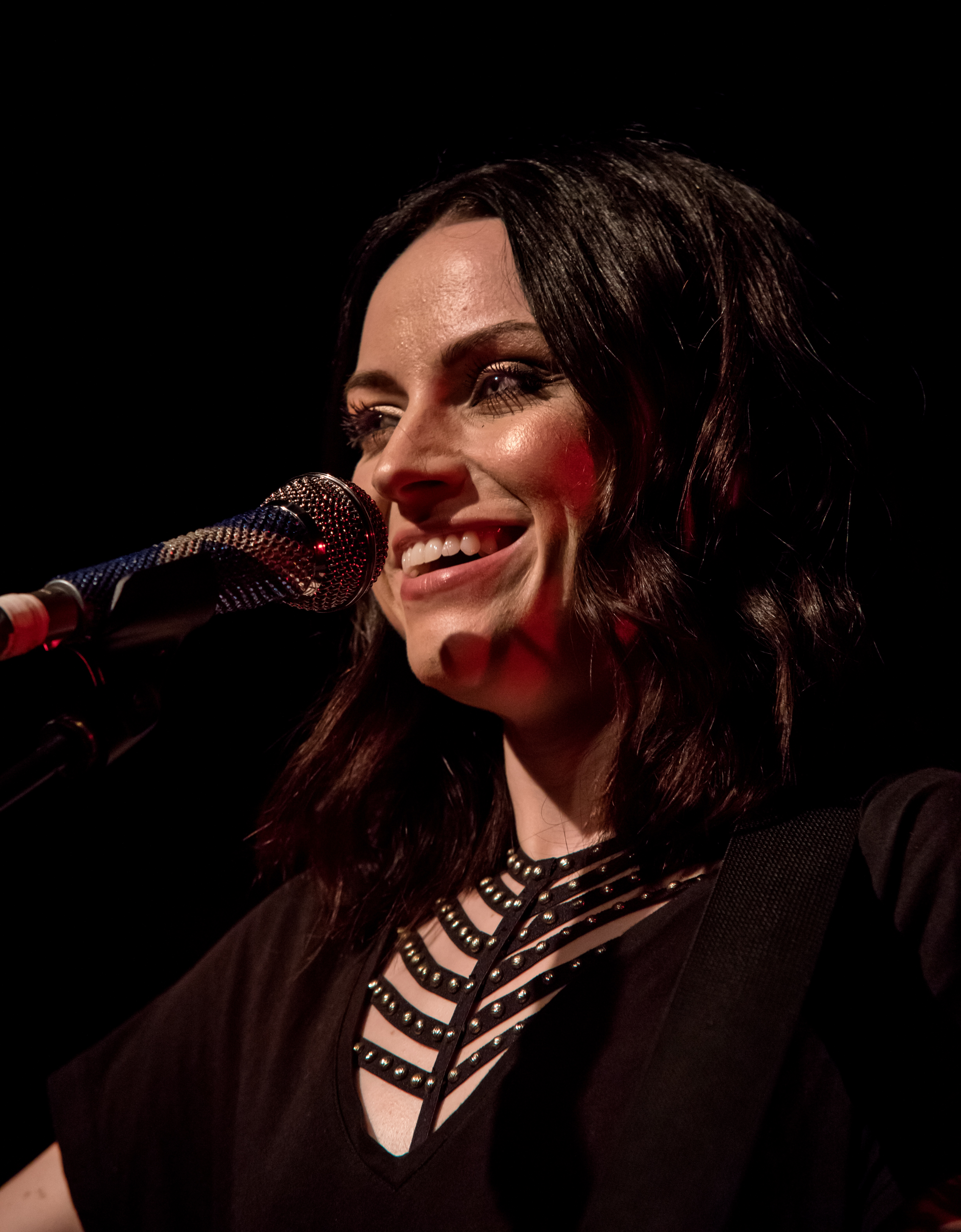 Bilder vom Zelt Musik Festival 2017 in Freiburg im Breisgau